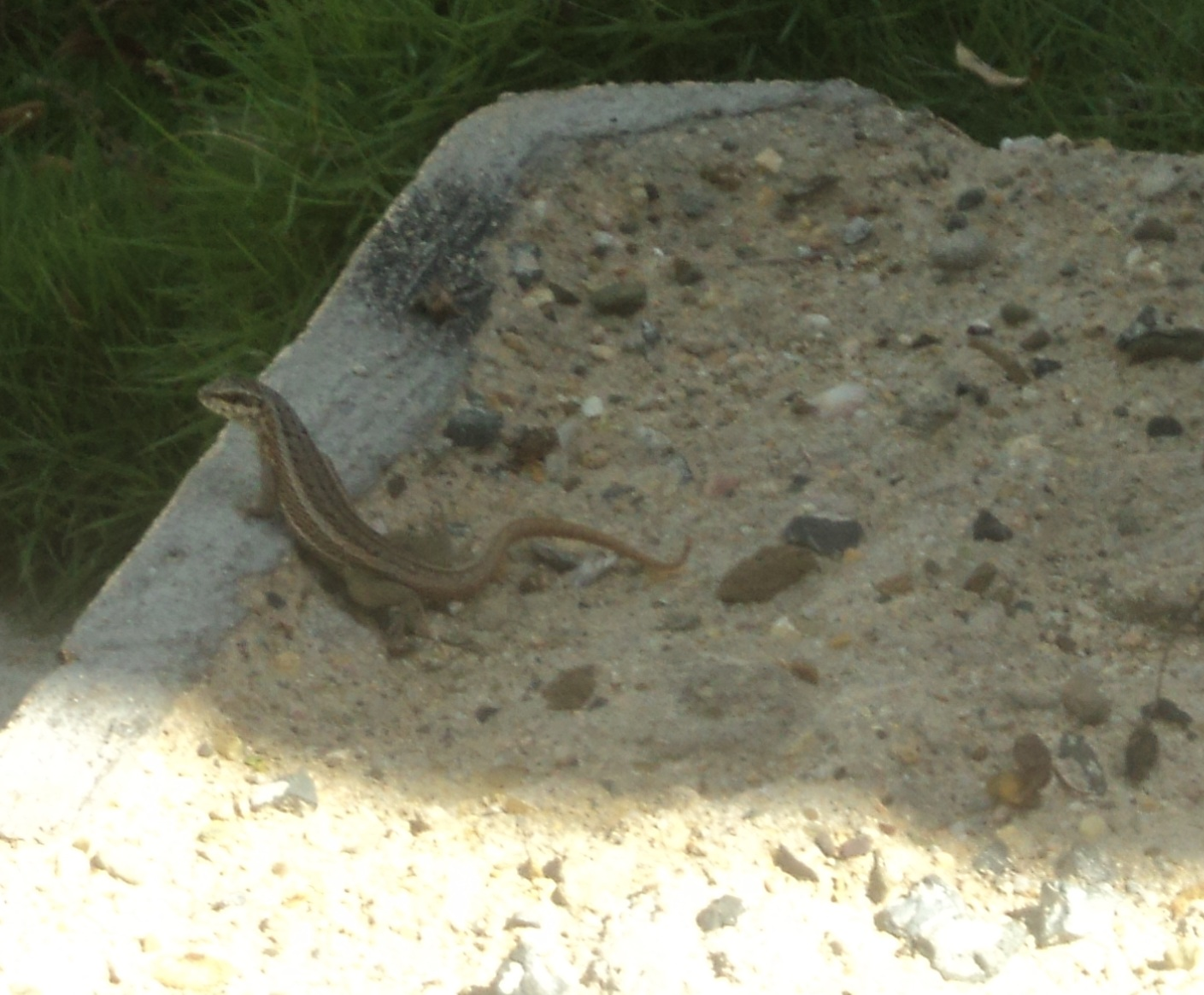 barrio la piedra, san pedro de macorís, republica dominicana